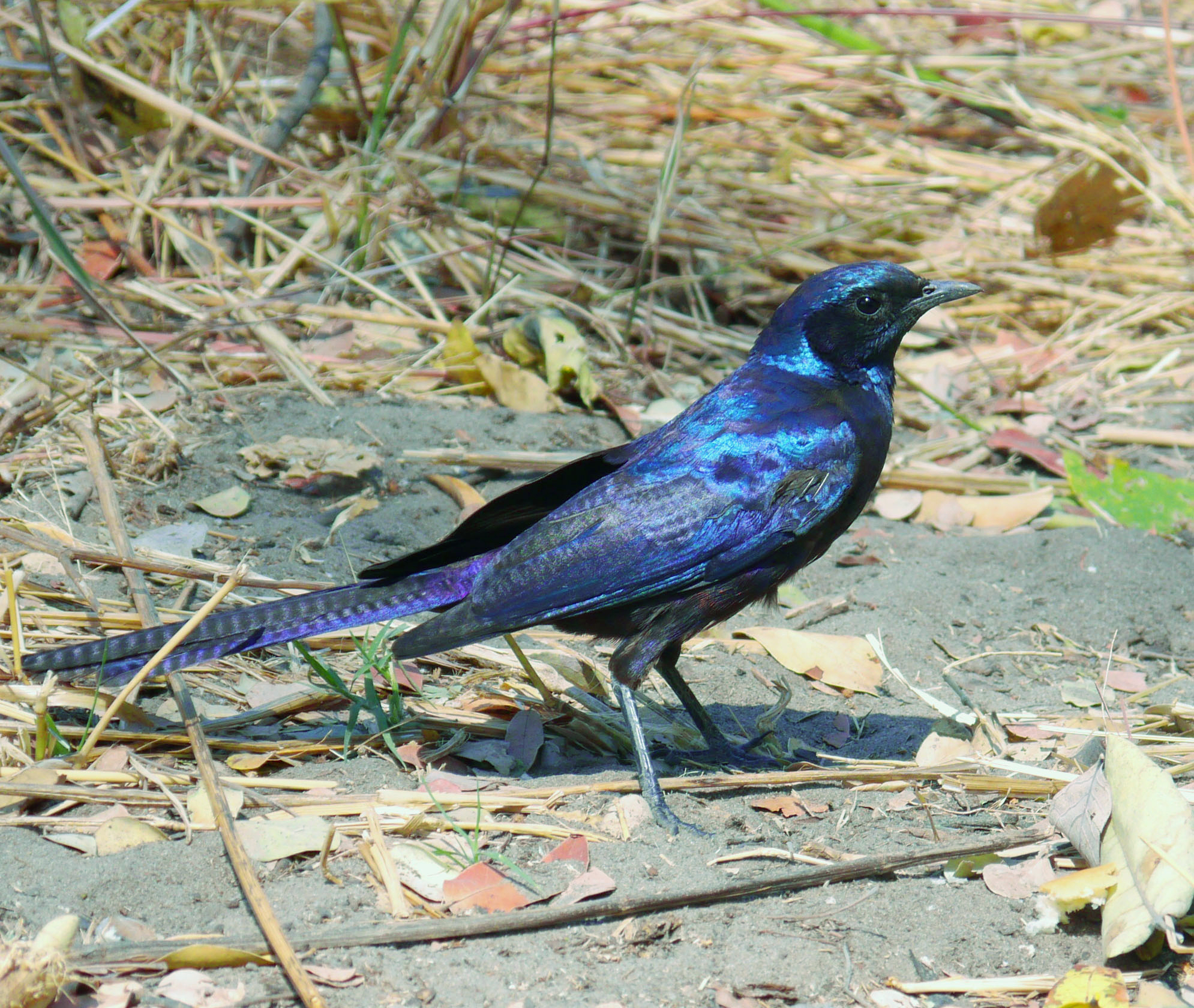 Lamprotornis mevesii in Moremi Game Reserve (Botswana).